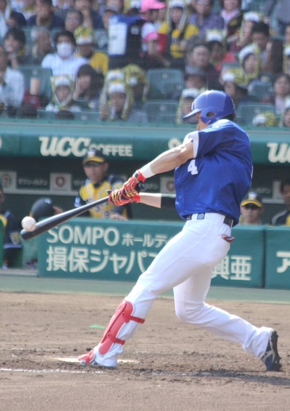 中日ドラゴンズ藤井淳志選手